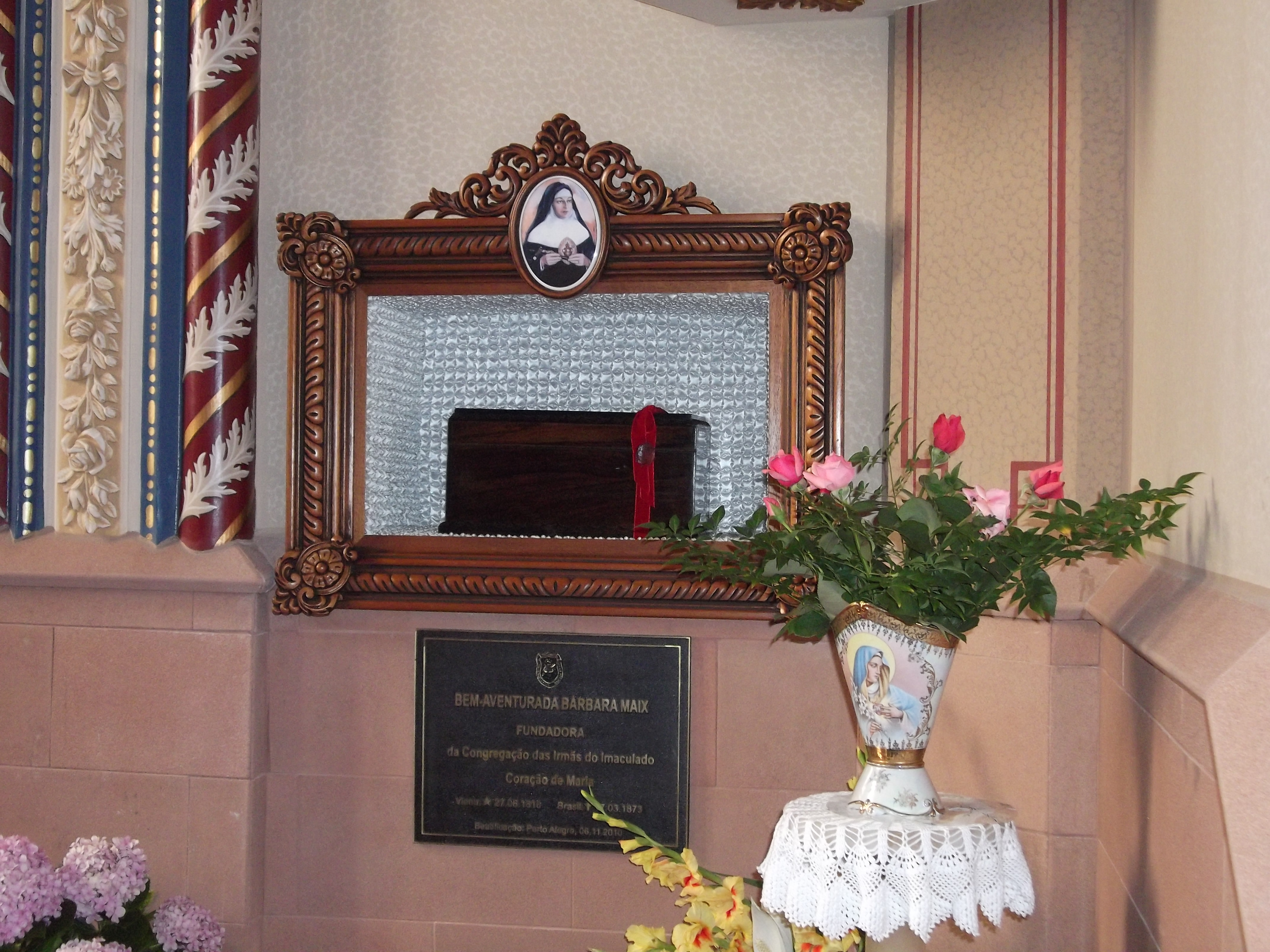 Relíquias de Barbara Maix na Igreja São Rafael em Porto Alegre, Rio Grande do Sul.